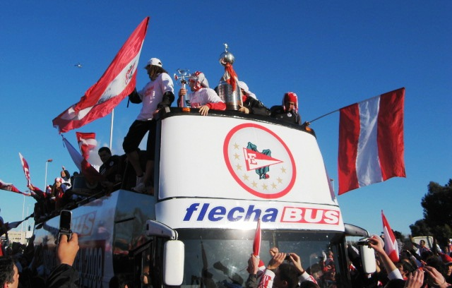 El plantel de Estudiantes de La Plata, al comenzar la caravana de festejos por la obtención de la Libertadores 2009, en el colectivo que los trasladó desde el Aeropuerto de Ezeiza a la ciudad de La Plata.